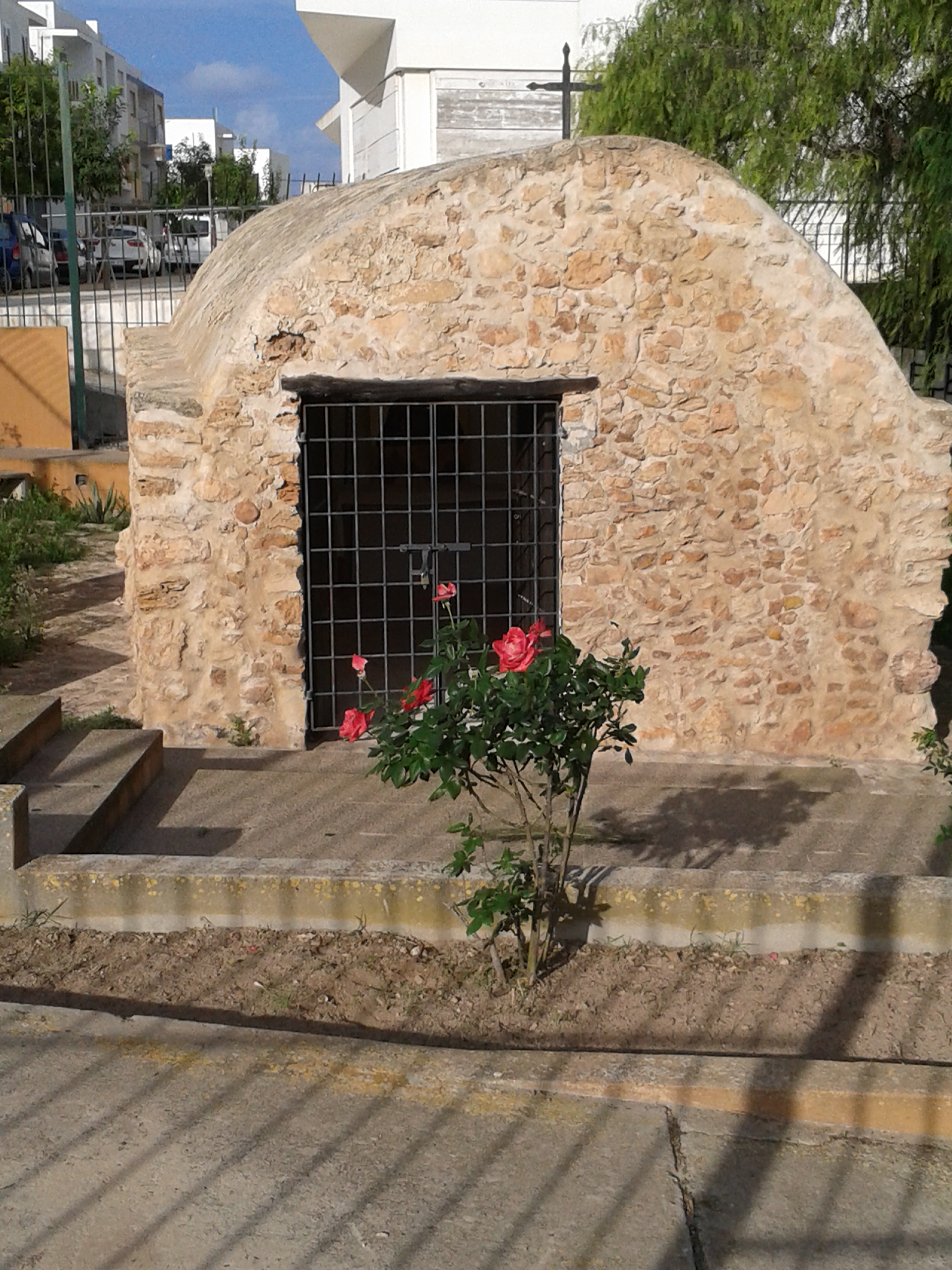 Vista frontal de Sa Capella de Sa Tanca Vella